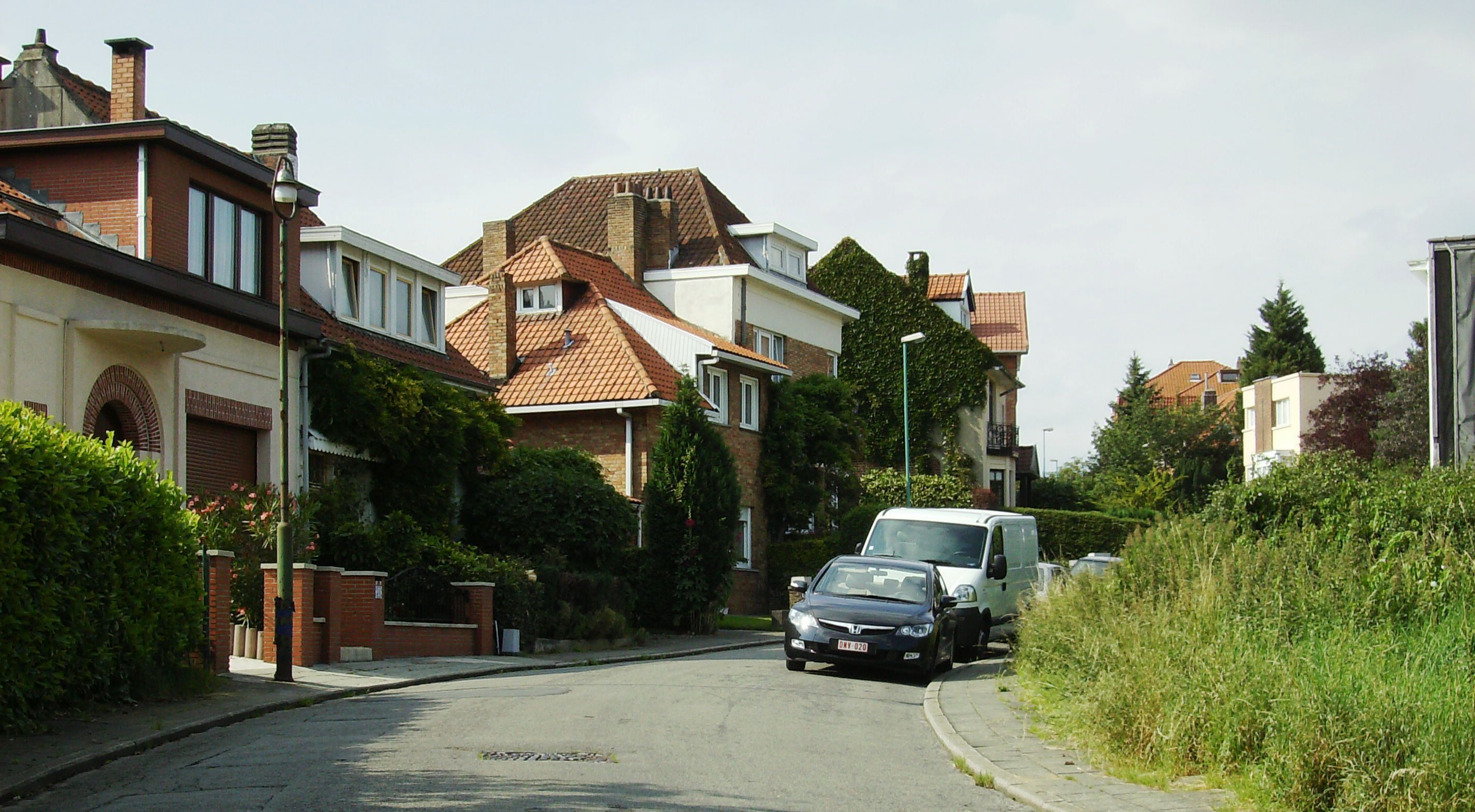 avenue du Loriot Auderghem Woluwe-Saint-Pierre Belgium